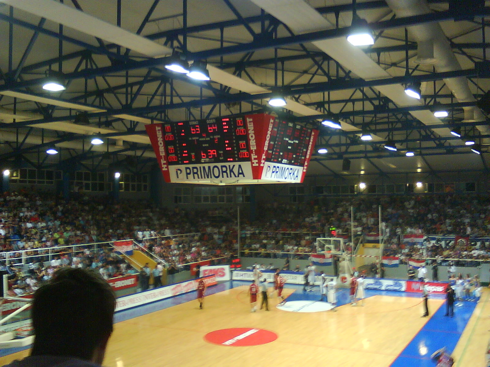 Pecara basketball stadium in Široki Brijeg